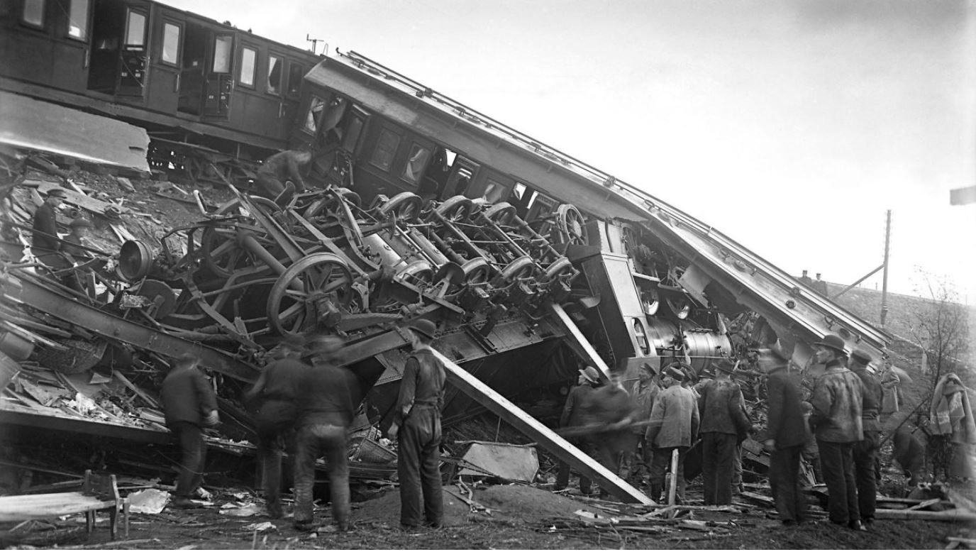 Billede af de ødelagte lokomotiver og vogne ved Vigerslevulykken 1919 Af Holger Damgaard (1870–1945)